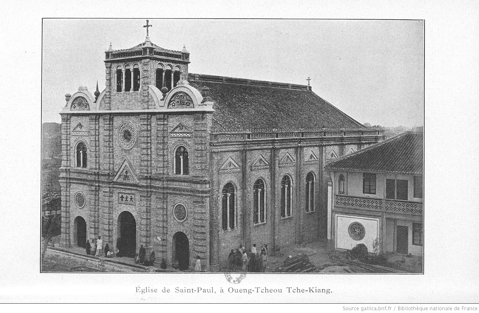 Église Saint-Paul de Oueng Tchéou (Wenzhou aujourd'hui) construite par les lazaristes français. Photographie tirée de l'ouvrage de Mgr Reynaud C.M., Une autre Chine, Paillart, Abbeville, 1897.